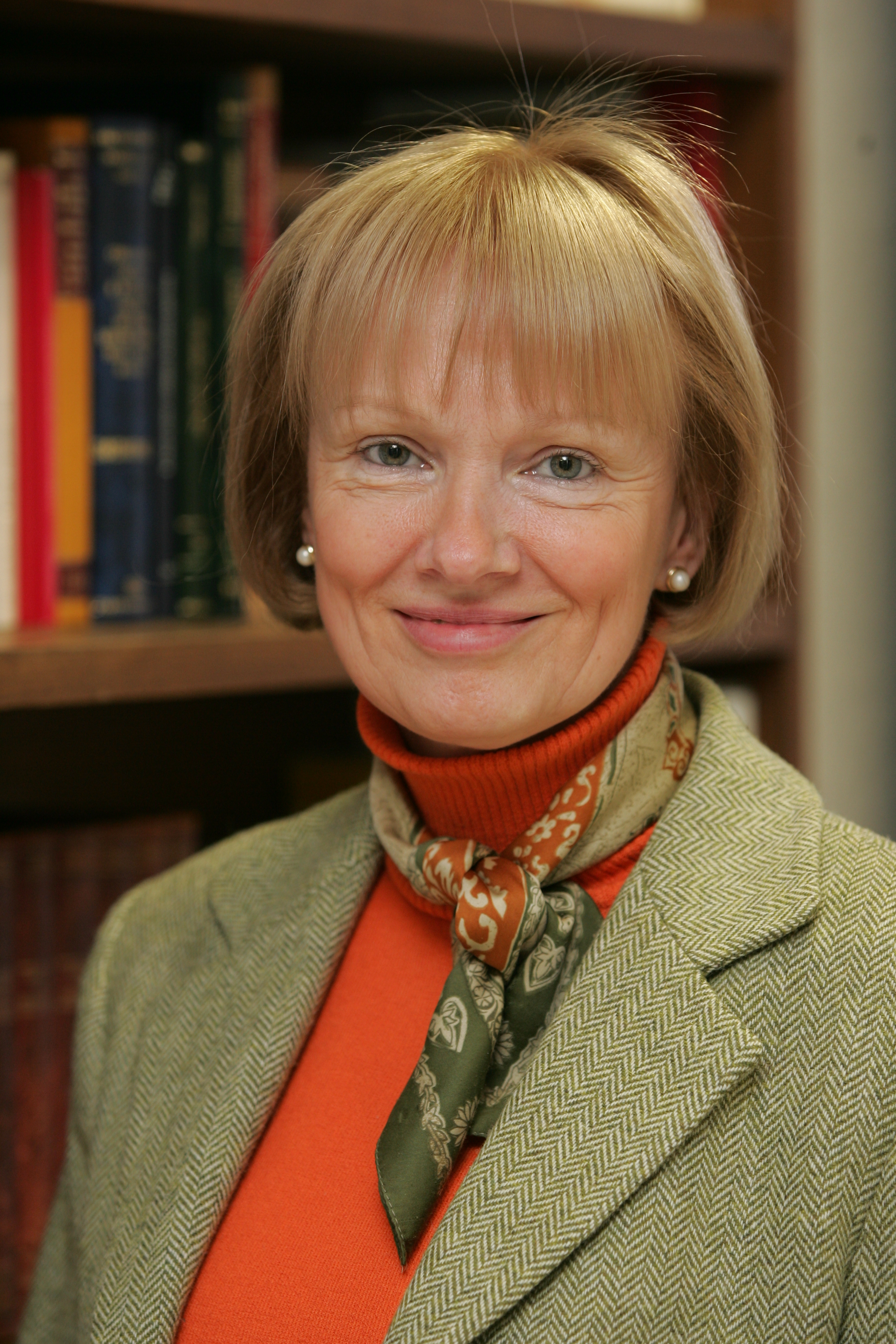 Jutta Burggraf, teóloga católica alemana